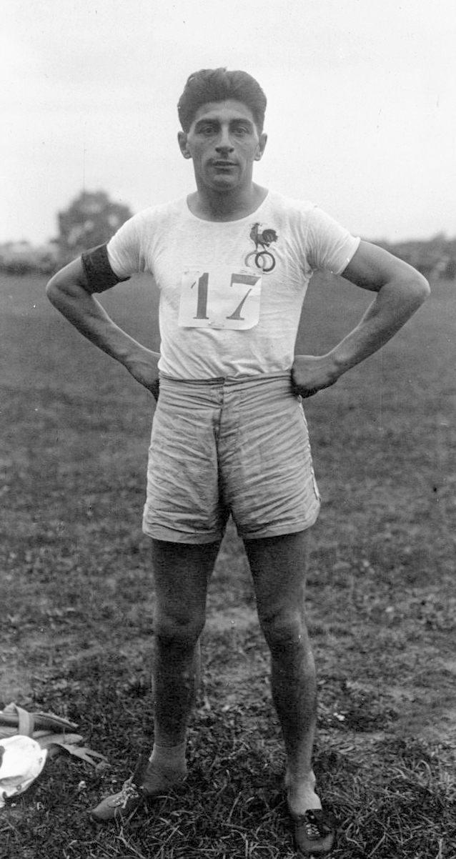 Colombes : match d'athlétisme France - Angleterre : Couillaud gagnant du saut en longueur : [photographie de presse] / Agence Meurisse